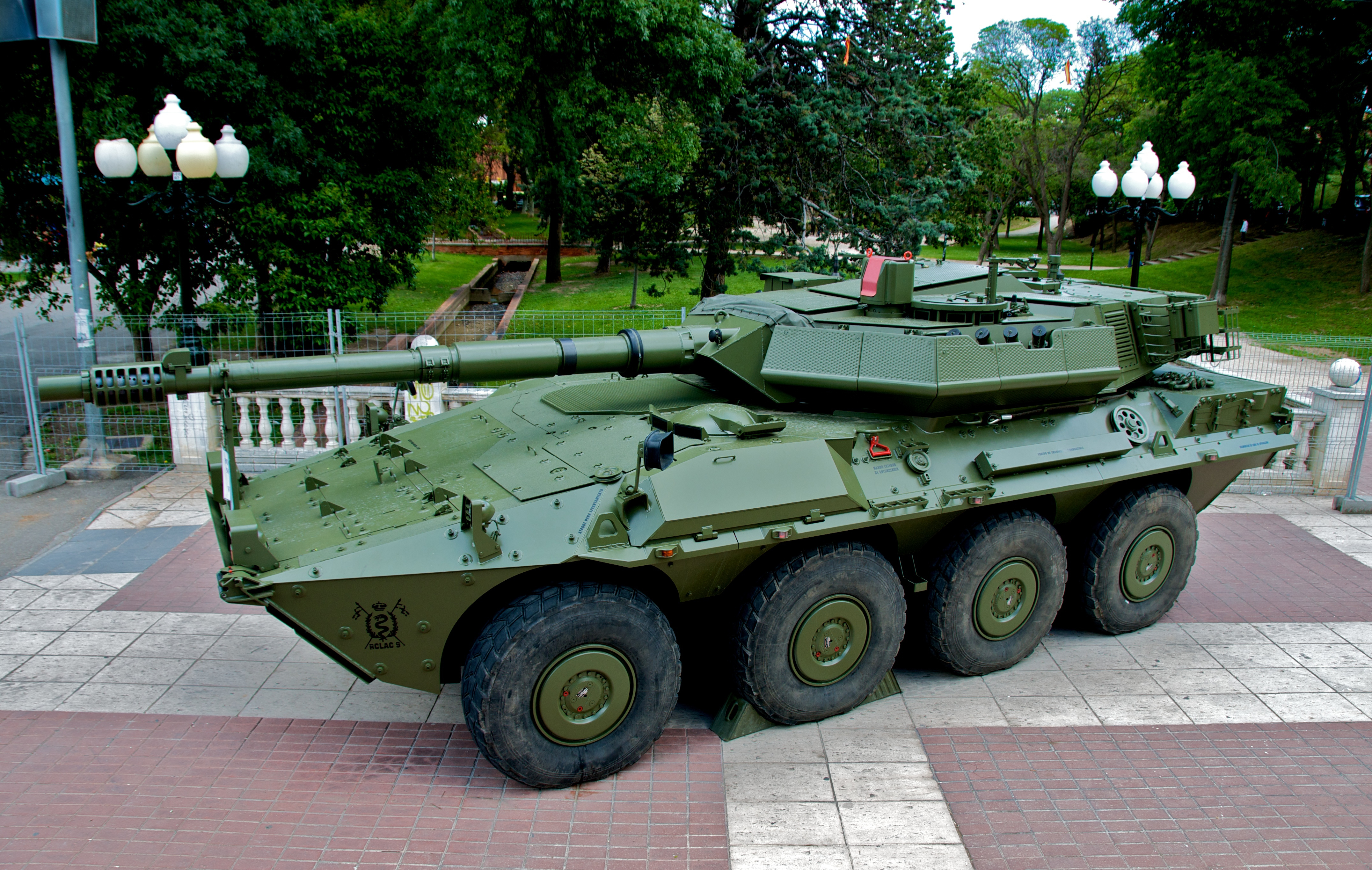 Día de la Fuerzas Armadas de España. Zaragoza.